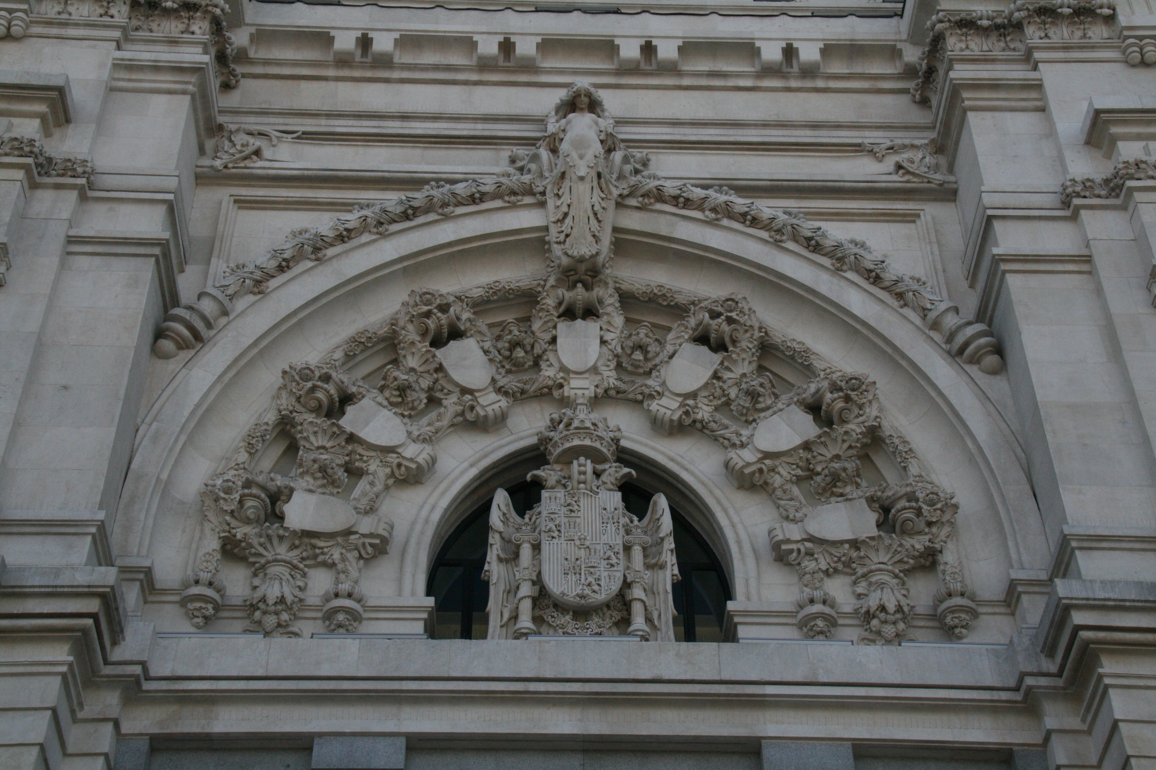 Palacio de Comunicaciones -Portada